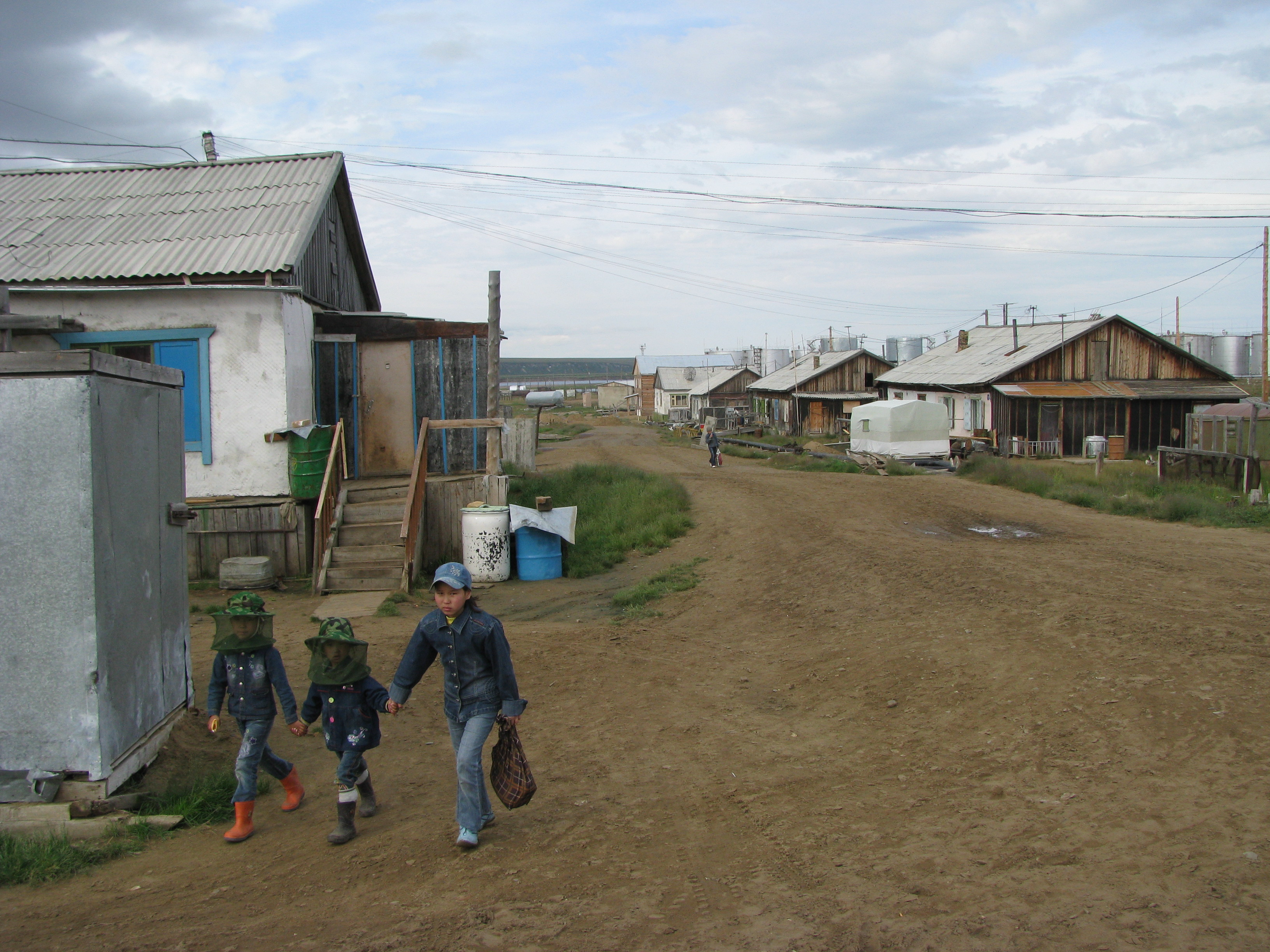 Автор: Vladislav Kyamyarya